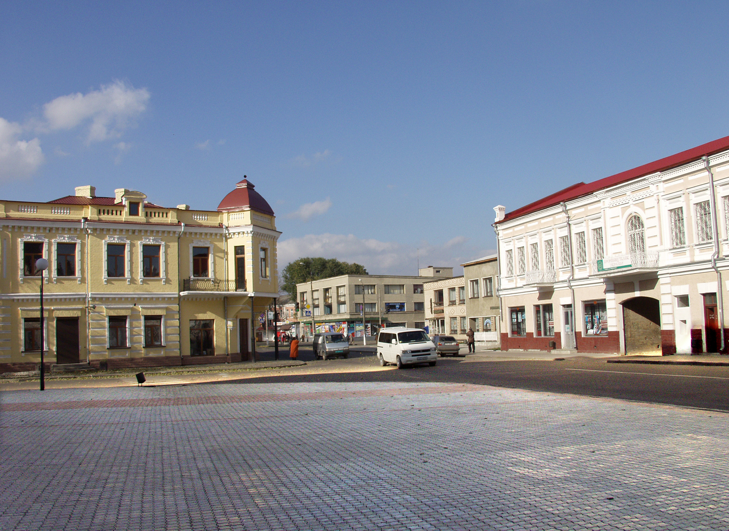 Житловий будинок (мур.), Ковель, вул. Незалежності, 89